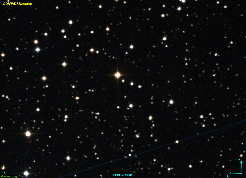 Image créée à l'aide du logiciel Aladin Sky Atlas du Centre de Données astronomiques de Strasbourg et des données publiques en format FIT de DSS (Digitized Sky Survey).